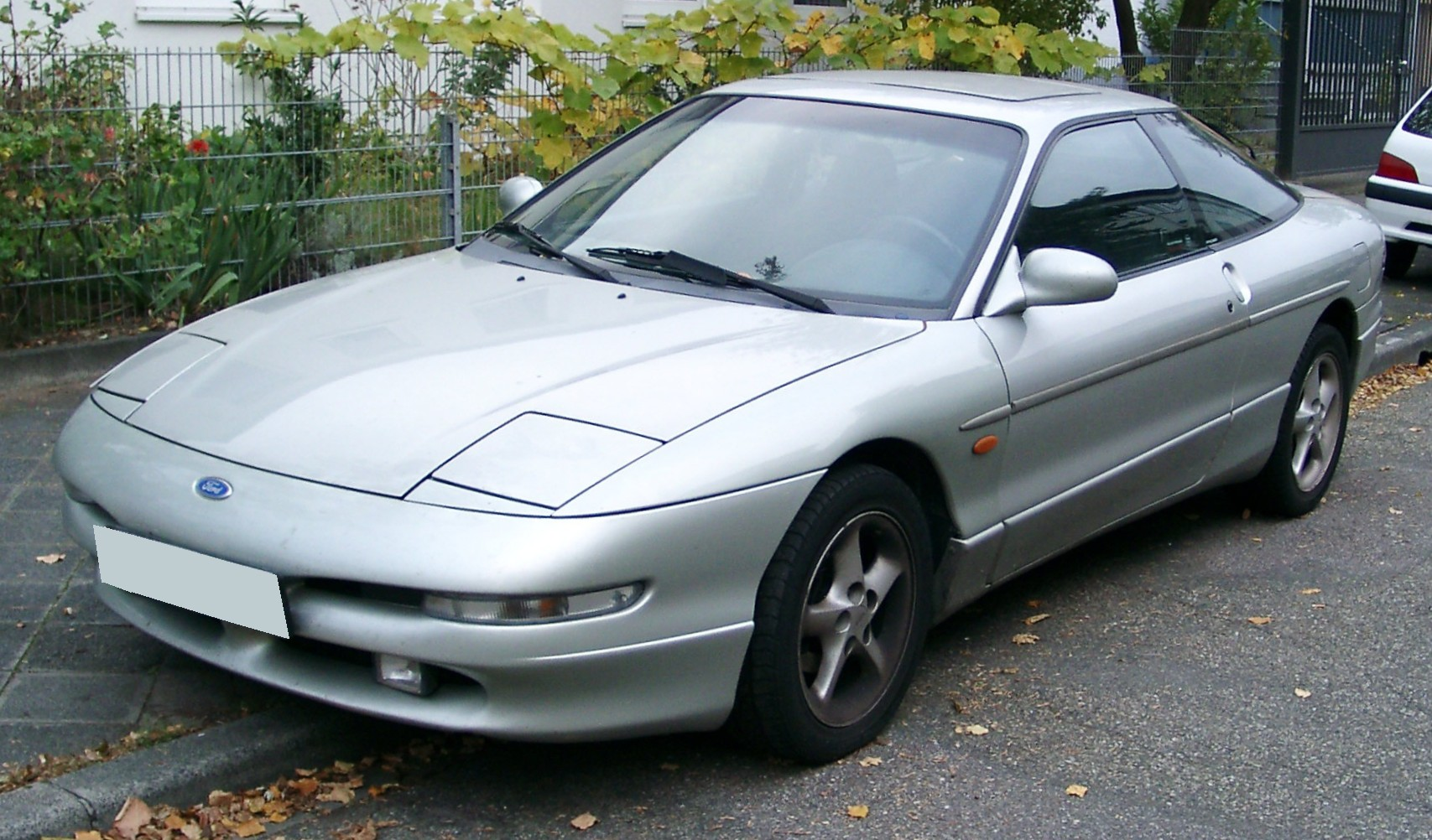 Ford Probe, 2. Generation